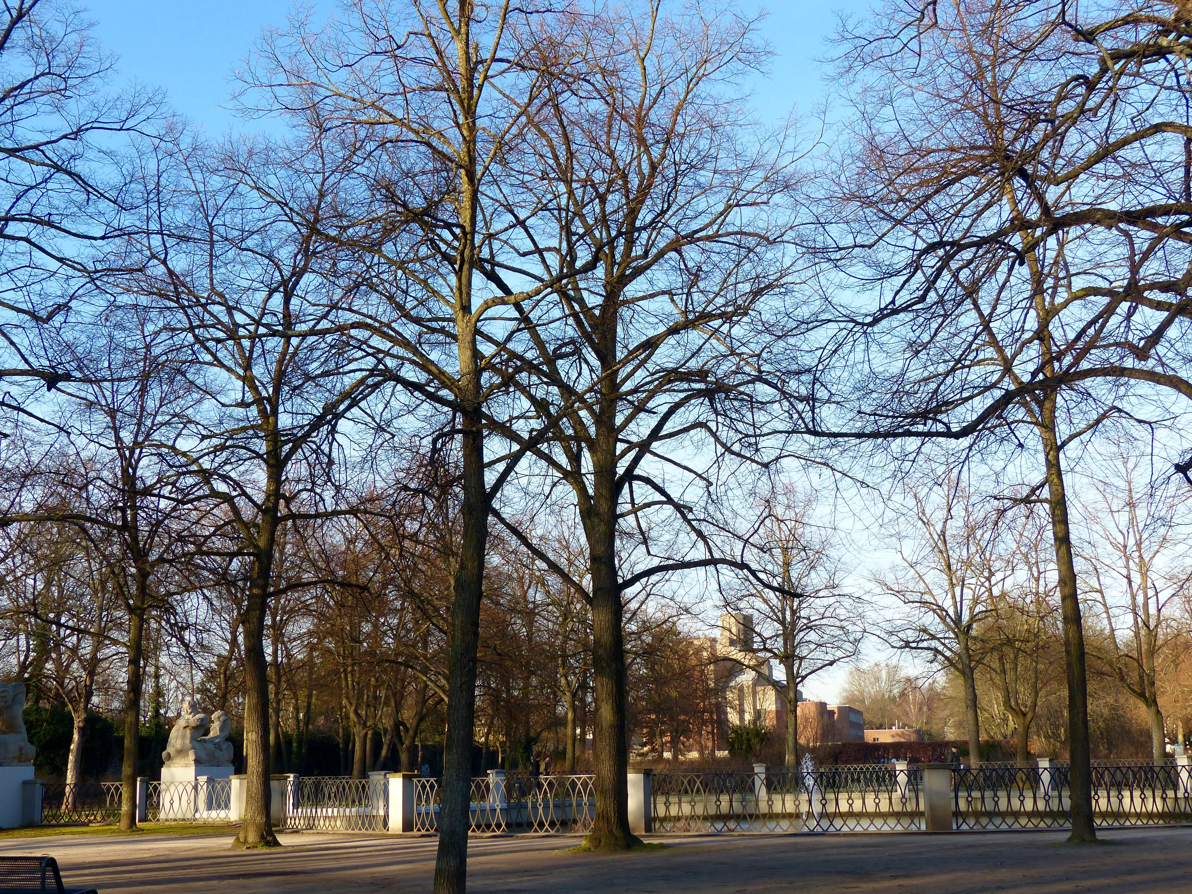 Köln-Lindenthal: Karl-Schwering-Platz